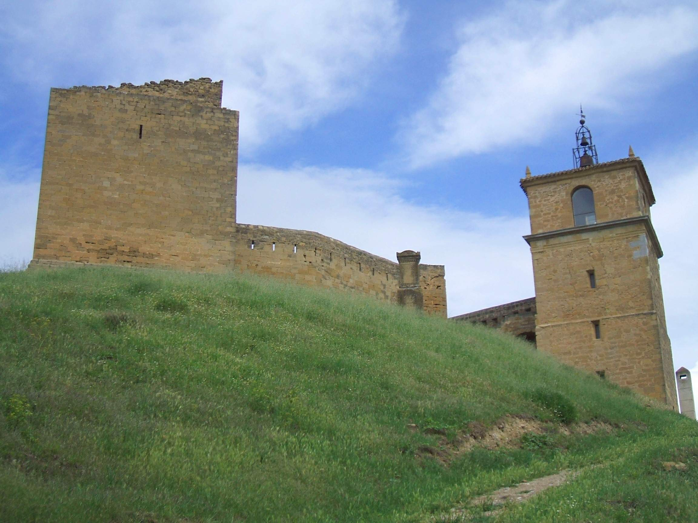 San Vicente de la Sonsierra (La Rioja, España) - Castillo